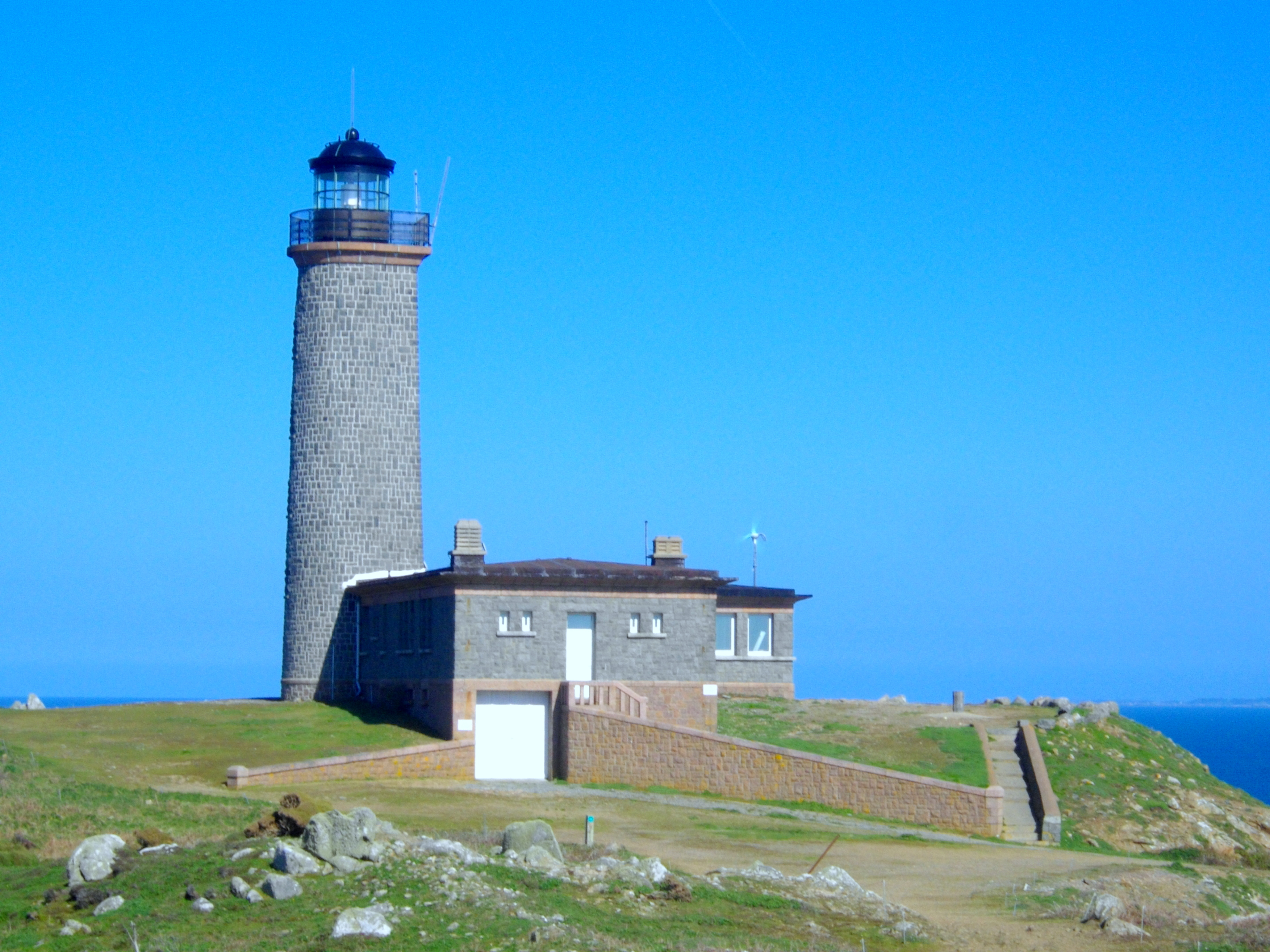 Phare sur l'Île aux moines (Sept-Îles)